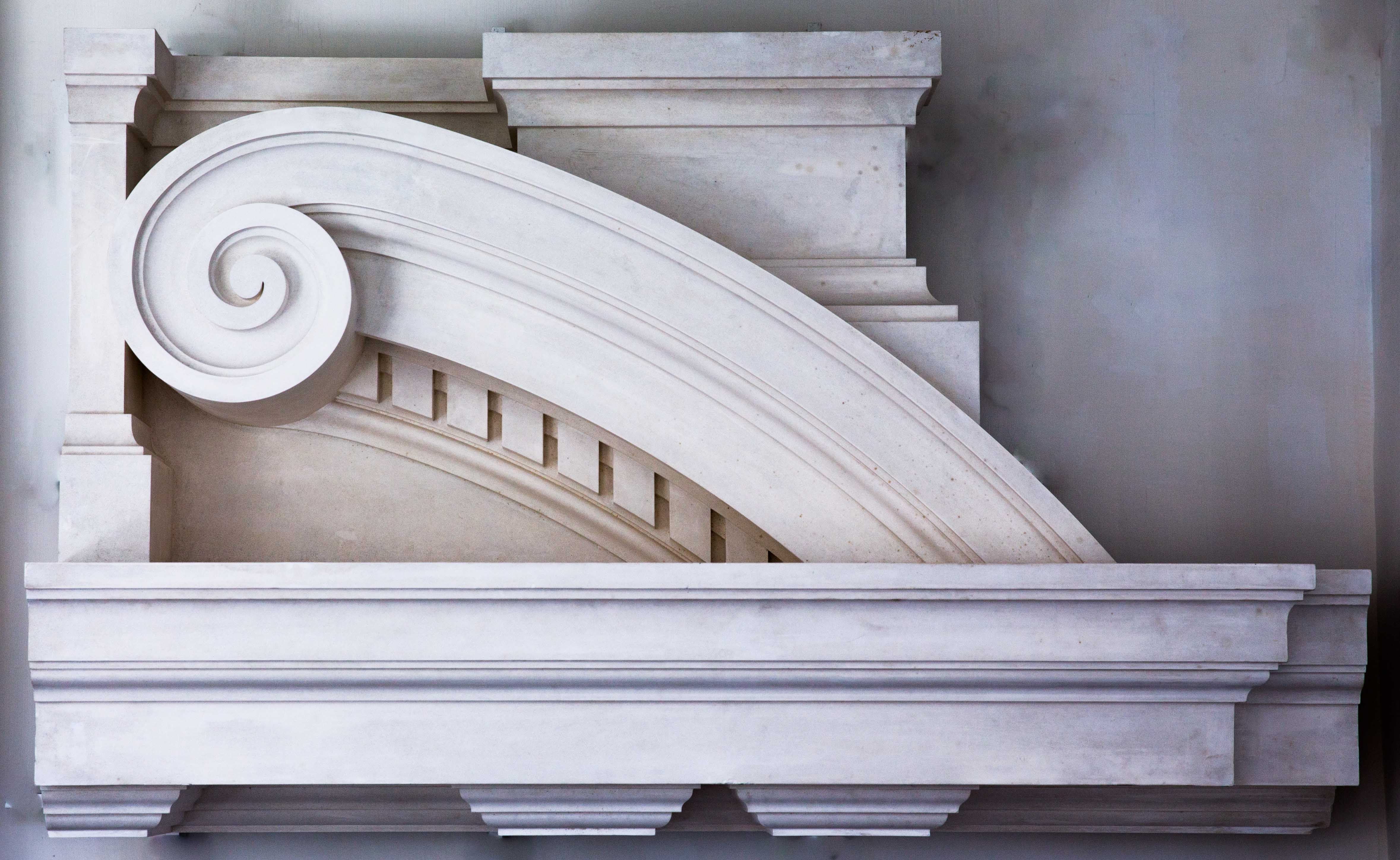 Fronton brisé à volute, réalisé en staff par Monsieur Frédéric Pirot. Meilleur Ouvrier de France - Staffeur ornemaniste. Echelle grandeur. Ce demi fronton est exposé au musée du plâtre de Cormeilles-en-Parisis.Plan de Monsieur Dauphin Roger d'après un porche des immeubles Hausmammiens. Avenue de l'Observatoire. Paris